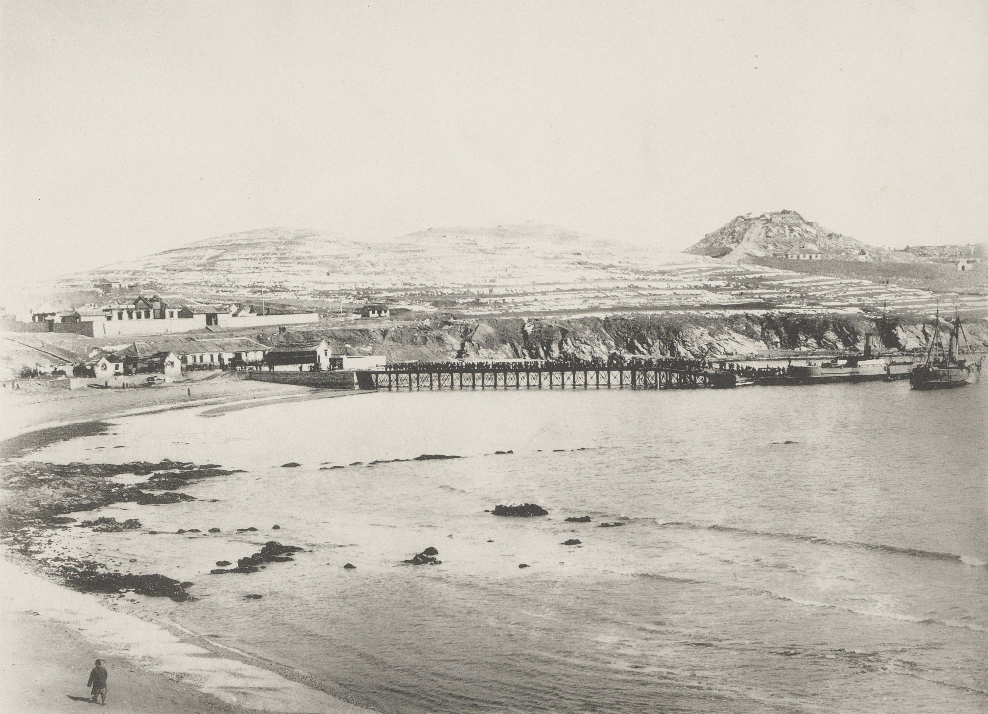 IdentificatieTitel(s): Aankomst van Chinese krijgsgevangenen te WeihaiweiThe landing of Chinese prisoners at Wei-Hai-Wei (titel op object)Objecttype: fotomechanische afdruk bladzijde Objectnummer: RP-F-2001-7-1637B-26Opschriften / Merken: opschrift, recto, gedrukt: ‘Expedition to Wei-Hai-Wei.’opschrift, recto, gedrukt: ‘The great building on the left is the torpedo station, while on the hill standing alone on the right is the electric light tower.’VervaardigingVervaardiger: fotograaf: Ordnance Survey Officeclichémaker: Kazumasa OgawaPlaats vervaardiging: fotograaf: Shandongclichémaker: JapanDatering: 16-feb-1895Materiaal: papier Techniek: lichtdrukAfmetingen: prent: h 207 mm × b 281 mmOnderwerpWat: prisoner of war (after the battle)transfer, deportation ~ prisoner of warVerwerving en rechtenCredit line: Aankoop met steun van de Mondriaan Stichting, het Prins Bernhard Cultuurfonds, het VSBfonds, het Paul Huf Fonds/Rijksmuseum Fonds en het Egbert KunstfondsVerwerving: aankoop 2001Copyright: Publiek domein